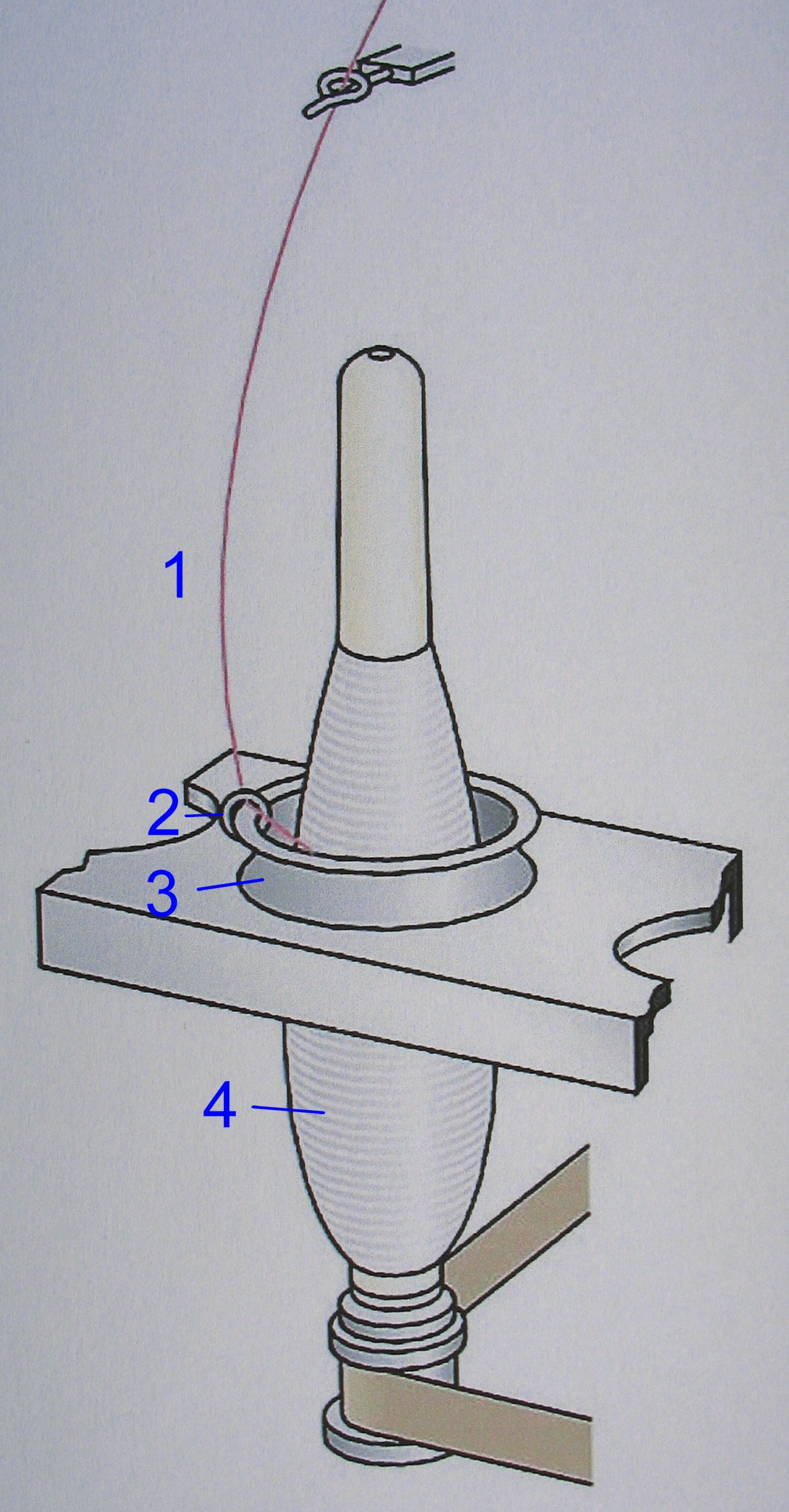 Funktionsschema: Ring und Ringläufer an der Ringspinnmaschine